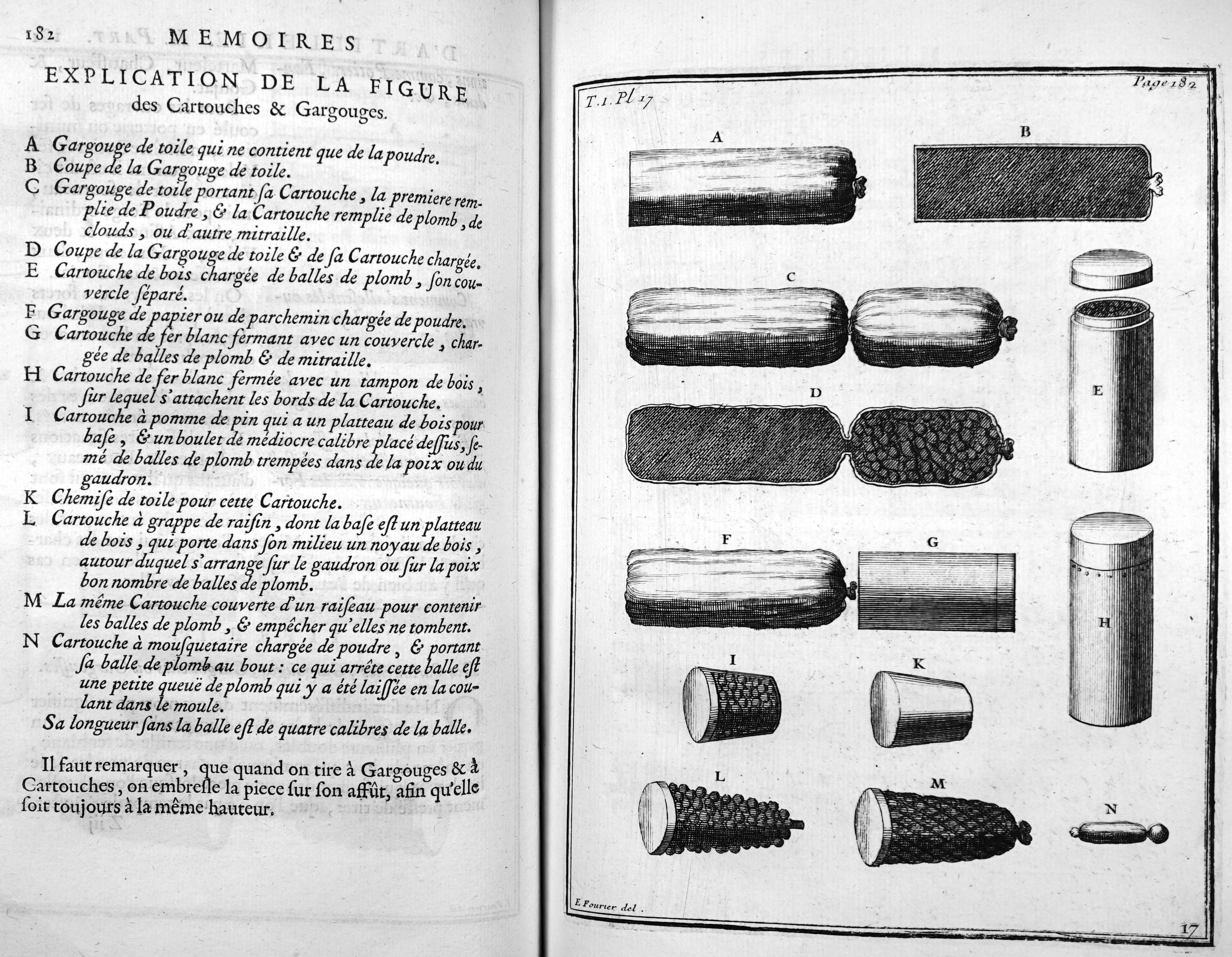 Mémoires d'artillerie, recueillis par M. Surirey de Saint Remy, exemplaire de la B.M. de Reims, troisième édition.